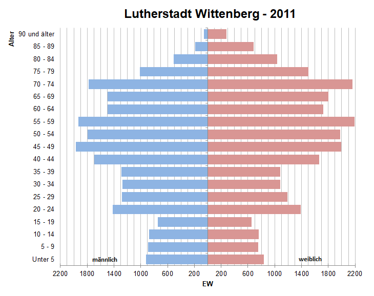 Bevölkerungspyramide der Lutherstadt Wittenberg nach Zensus 2011.